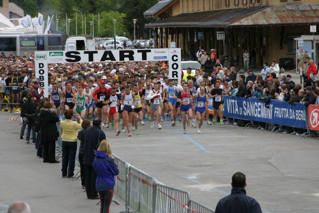 Startschuss zum Cortina-Dobbiaco Run